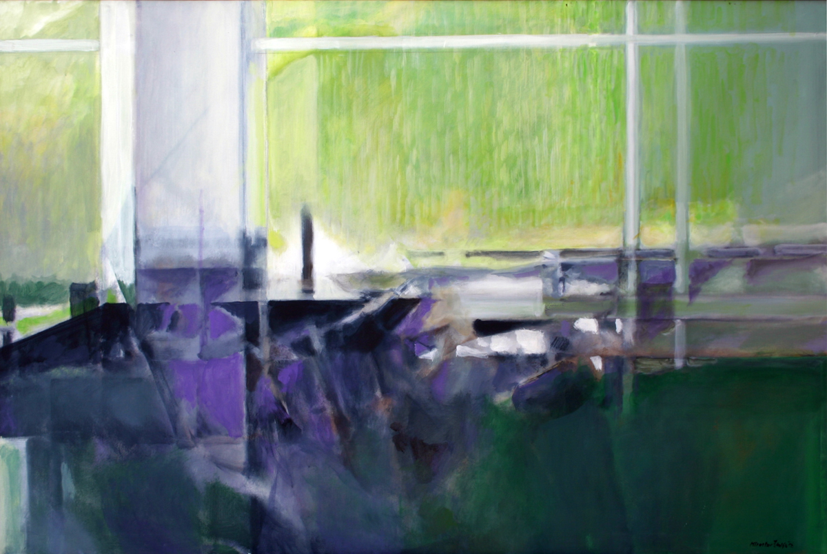 Miroslav Štolfa, Široký výhled, akryl, plátno, 100 x 150 cm, 2012